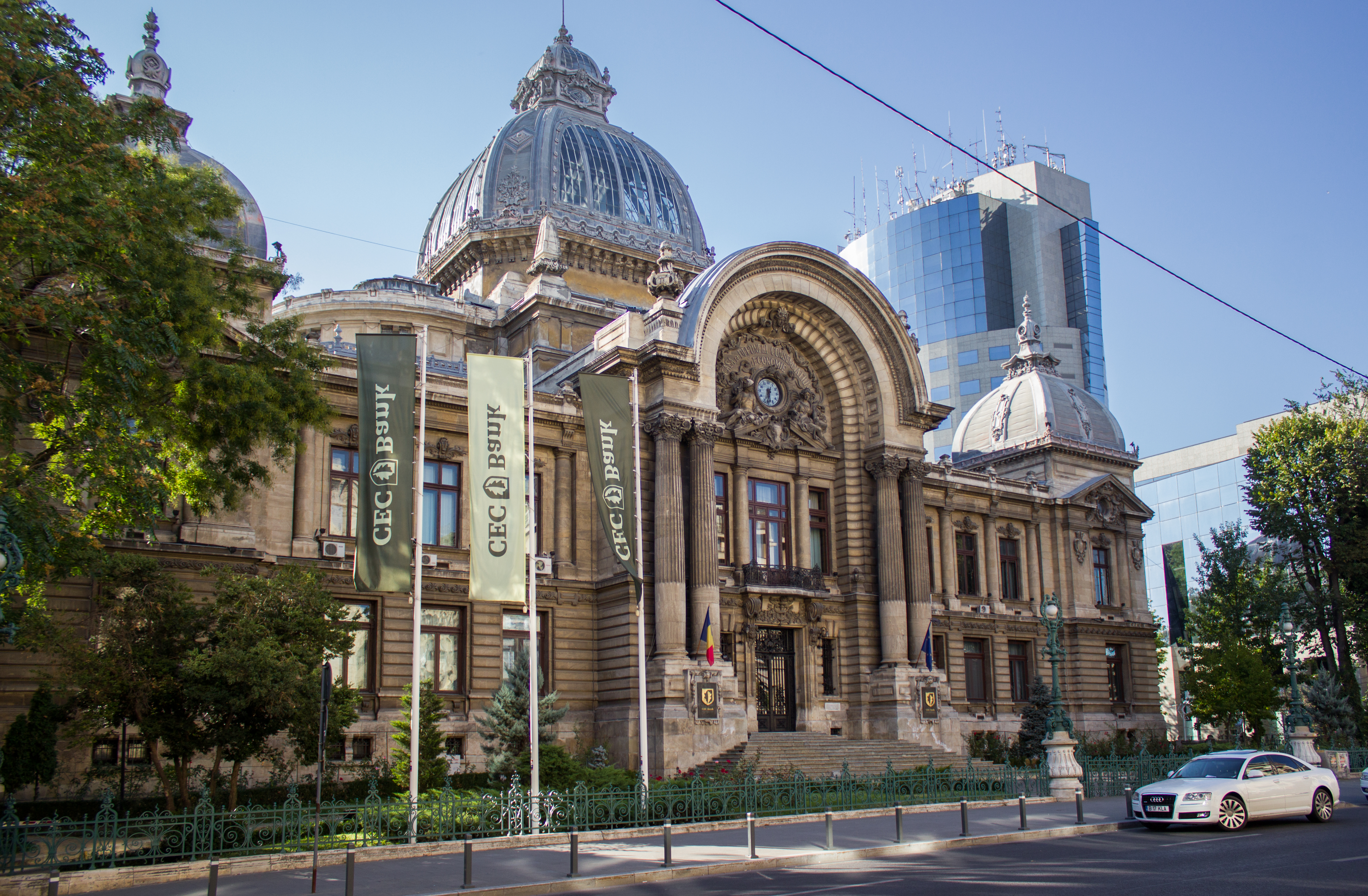 anul 1900 - Palatul Casei de Depuneri, Consemnațiuni și Economie, este o clădire din București, situată în Calea Victoriei, față în față cu Palatul Poștelor, construit în aceeași perioadă. Calea Victoriei 13, sector 3